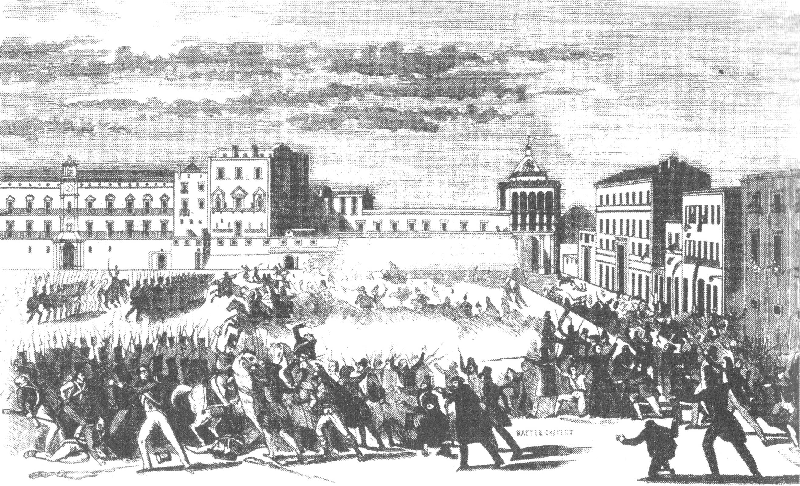 Illustrirte Zeitung, Leipzig, Nr. 242, 19. Februar 1848, 120. Kampf zwischen dem Volk von Palermo und königlichen Truppen am 13. Januar.